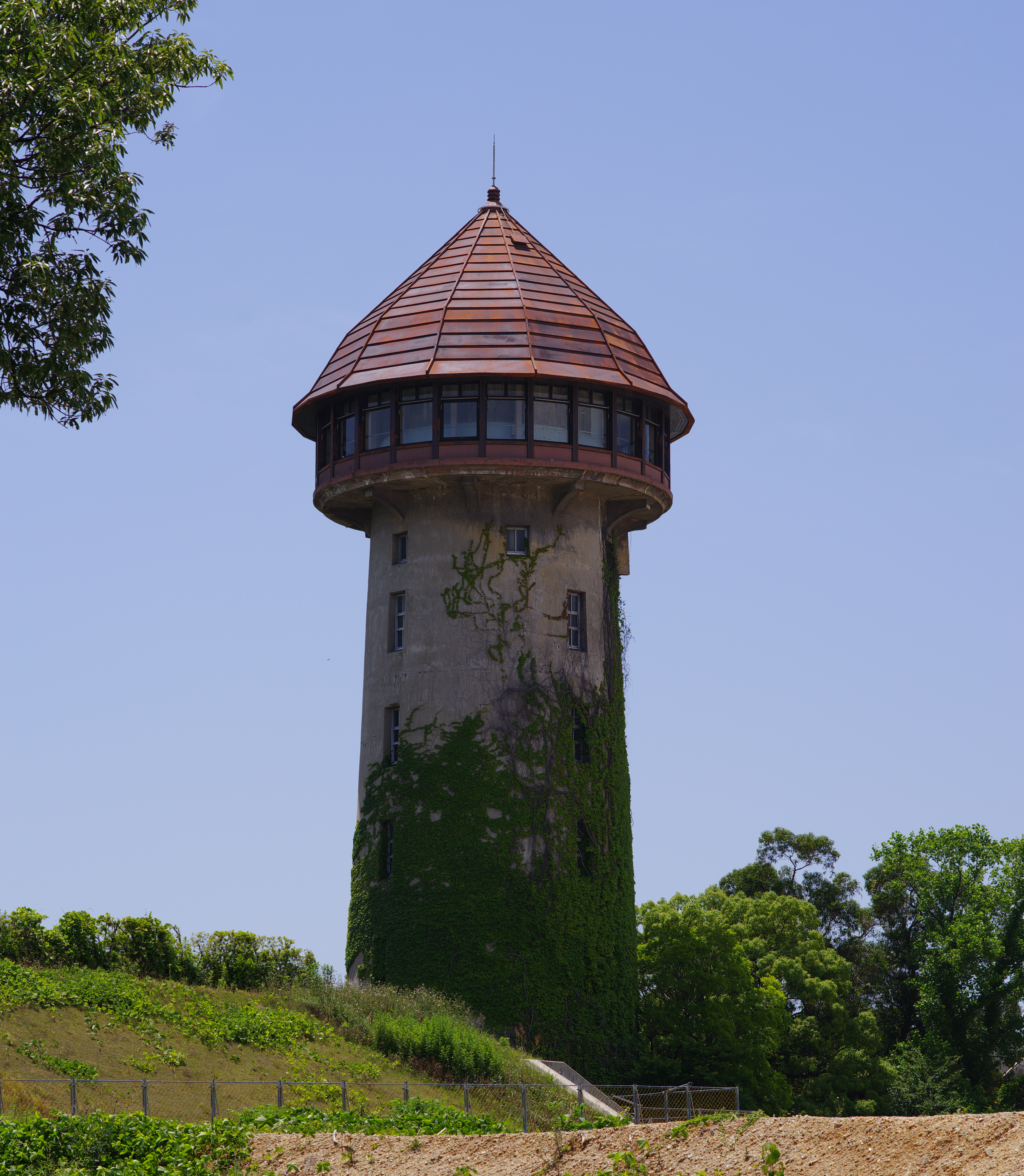 名古屋市千種区東山給水塔。北東よりみる。